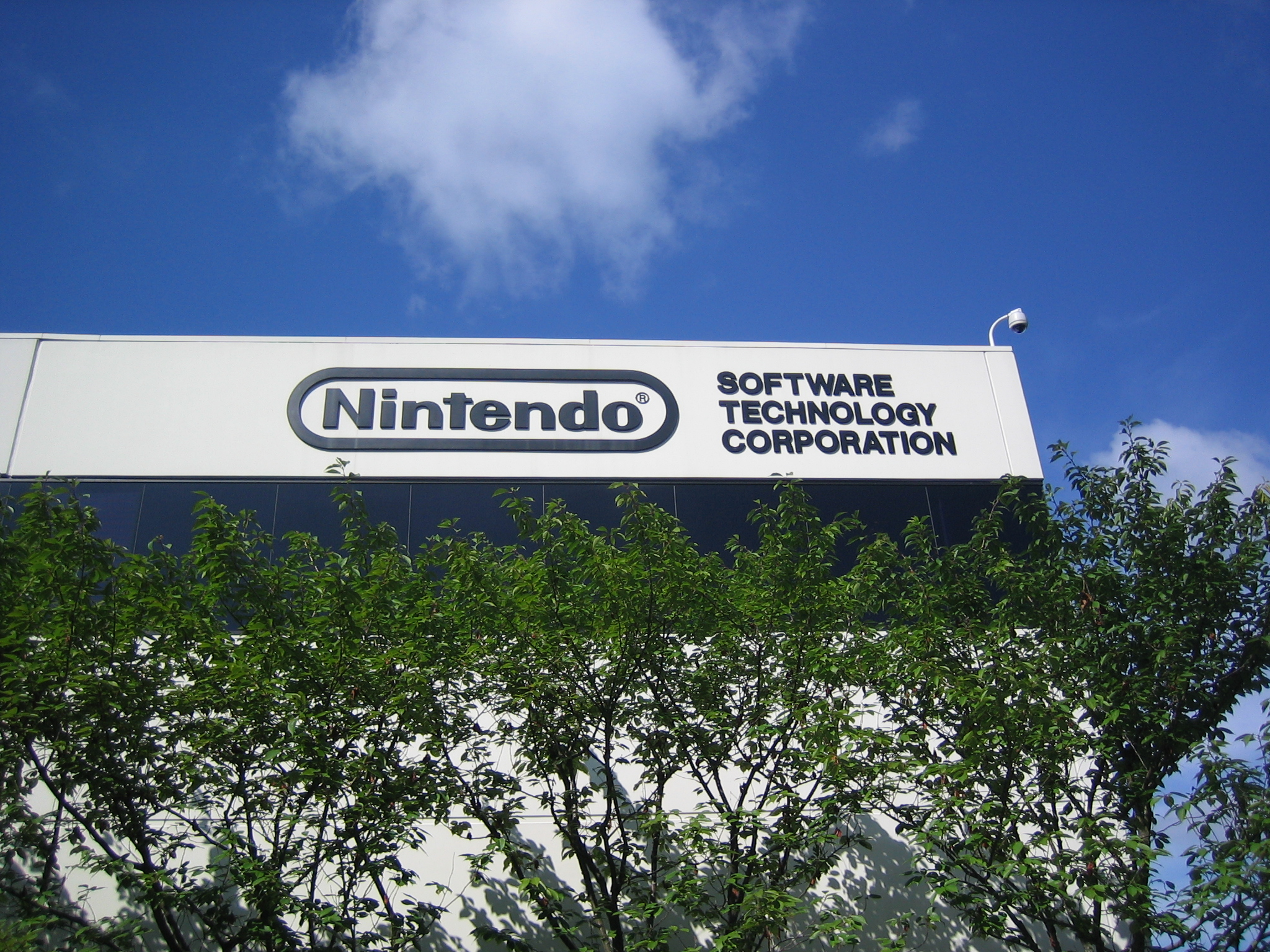 Photographie par Jeramey Jannene Photographie du studio Nintendo Software Technology à North Bend, Washington, Etats-Unis prise par Jeramey Jannene